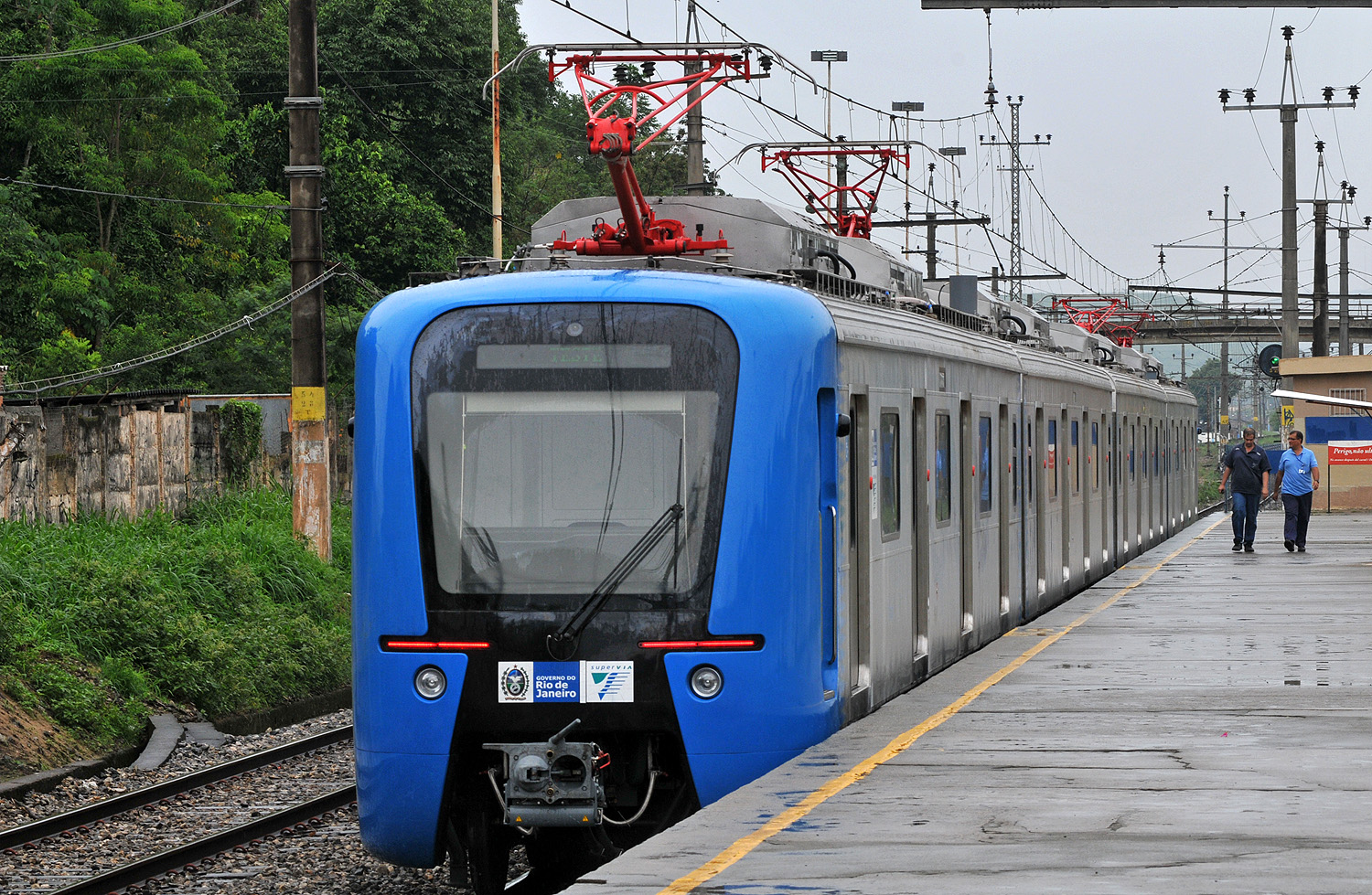 Trem chinês da SuperVia